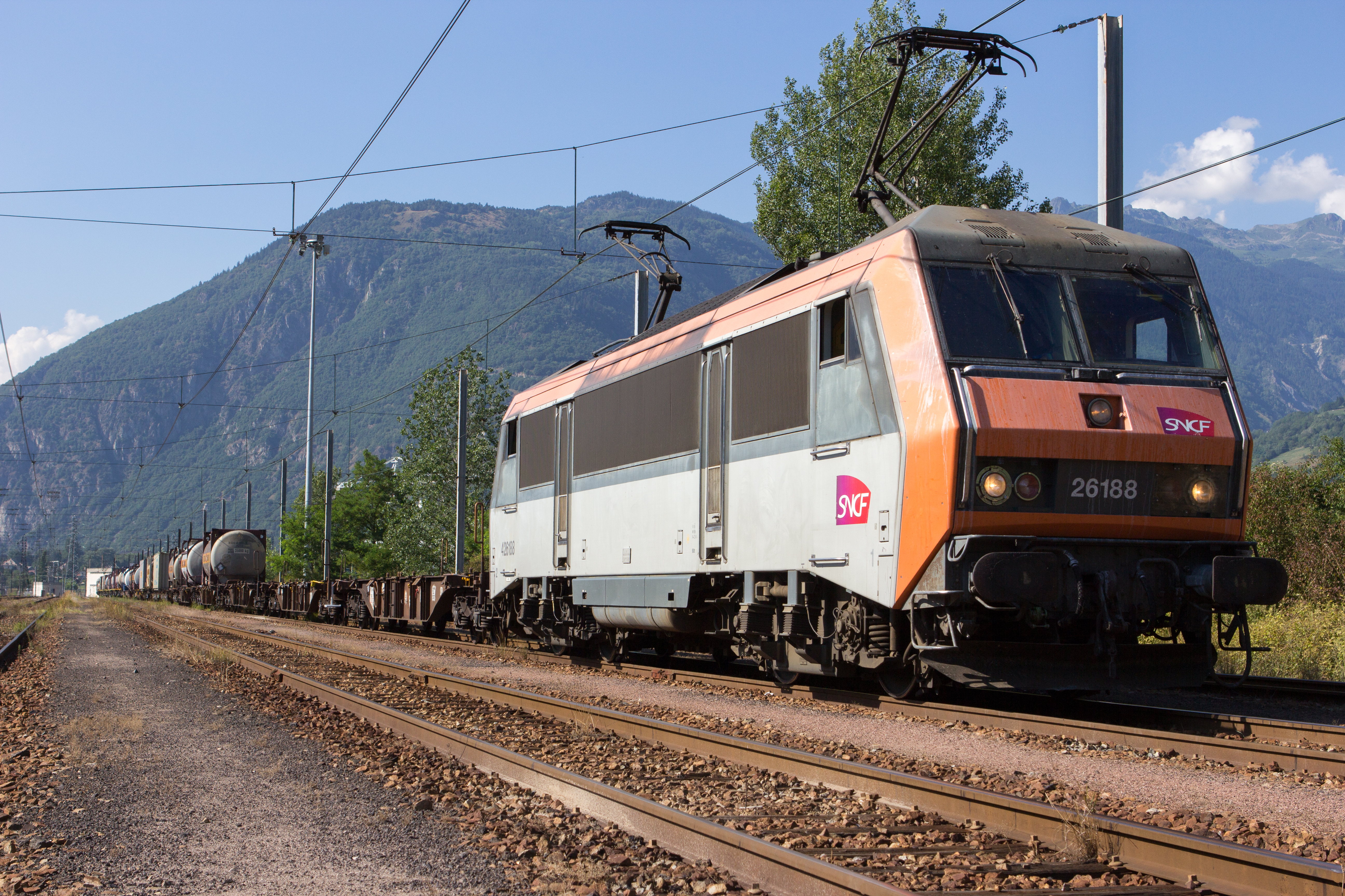 Ligne de la Maurienne, le faisceau de Saint-Avre / Saint-Avre, Savoie, France